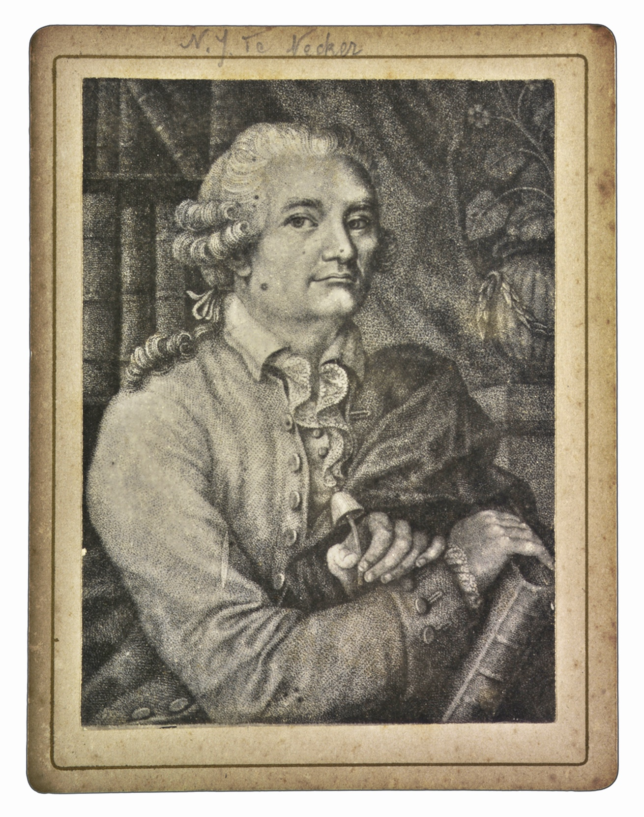 Noel Martin Joseph de Necker, kurpfälzisch kurfürstlicher Leibarzt und Hofbotaniker (1730-1793)